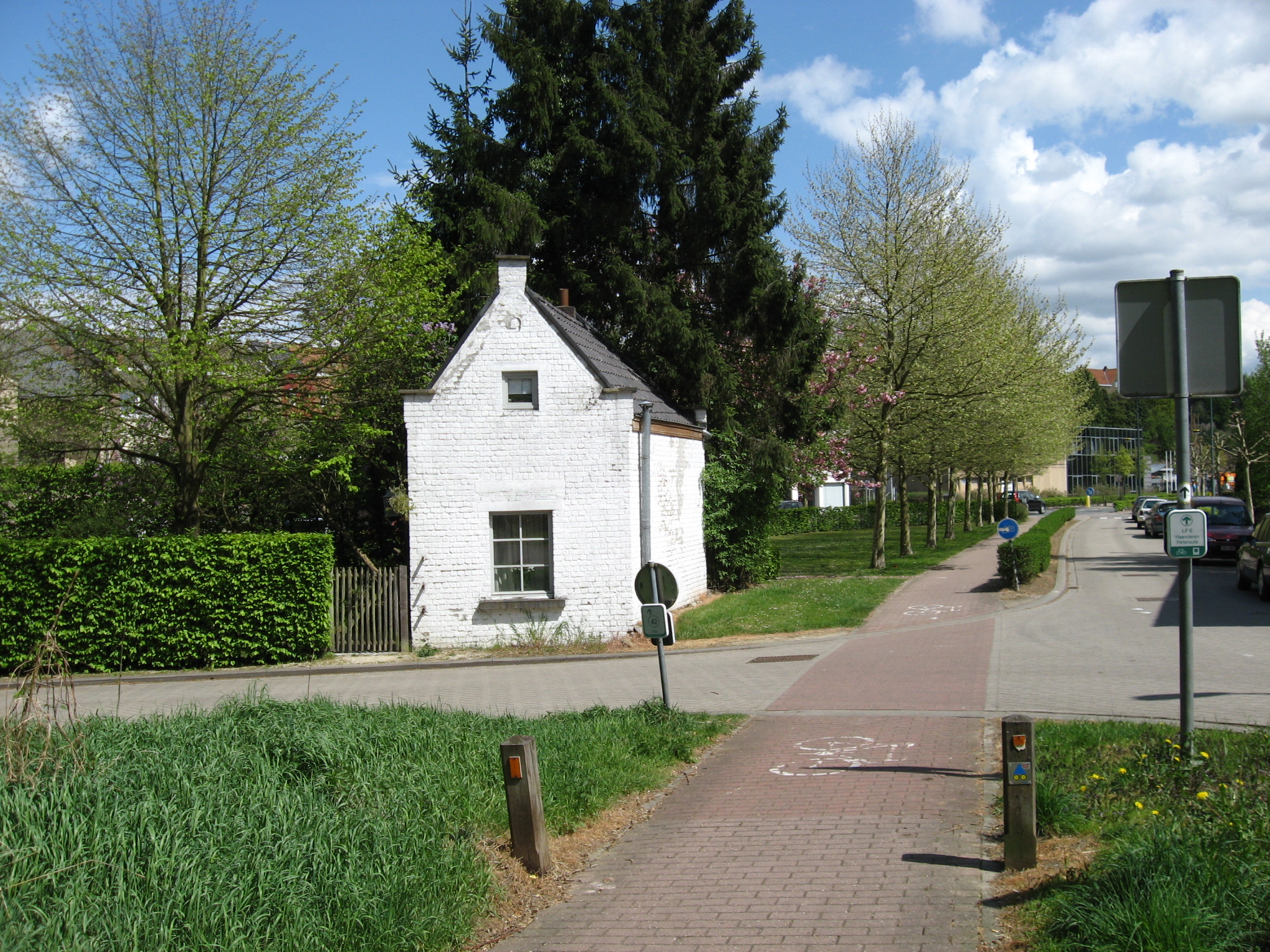 Voormalig spoorwegtracé nu ingericht als fietspad. Het gebouw is vermoedelijk een wachters huis. De halte Duinberg was hier.